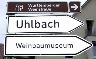 GNU-FDL Stuttgart-Uhlbach Württemberger Weinstraße von Benutzer:Enslin selbst fotografiert am 20.10.2004 Kategorie:Stuttgart